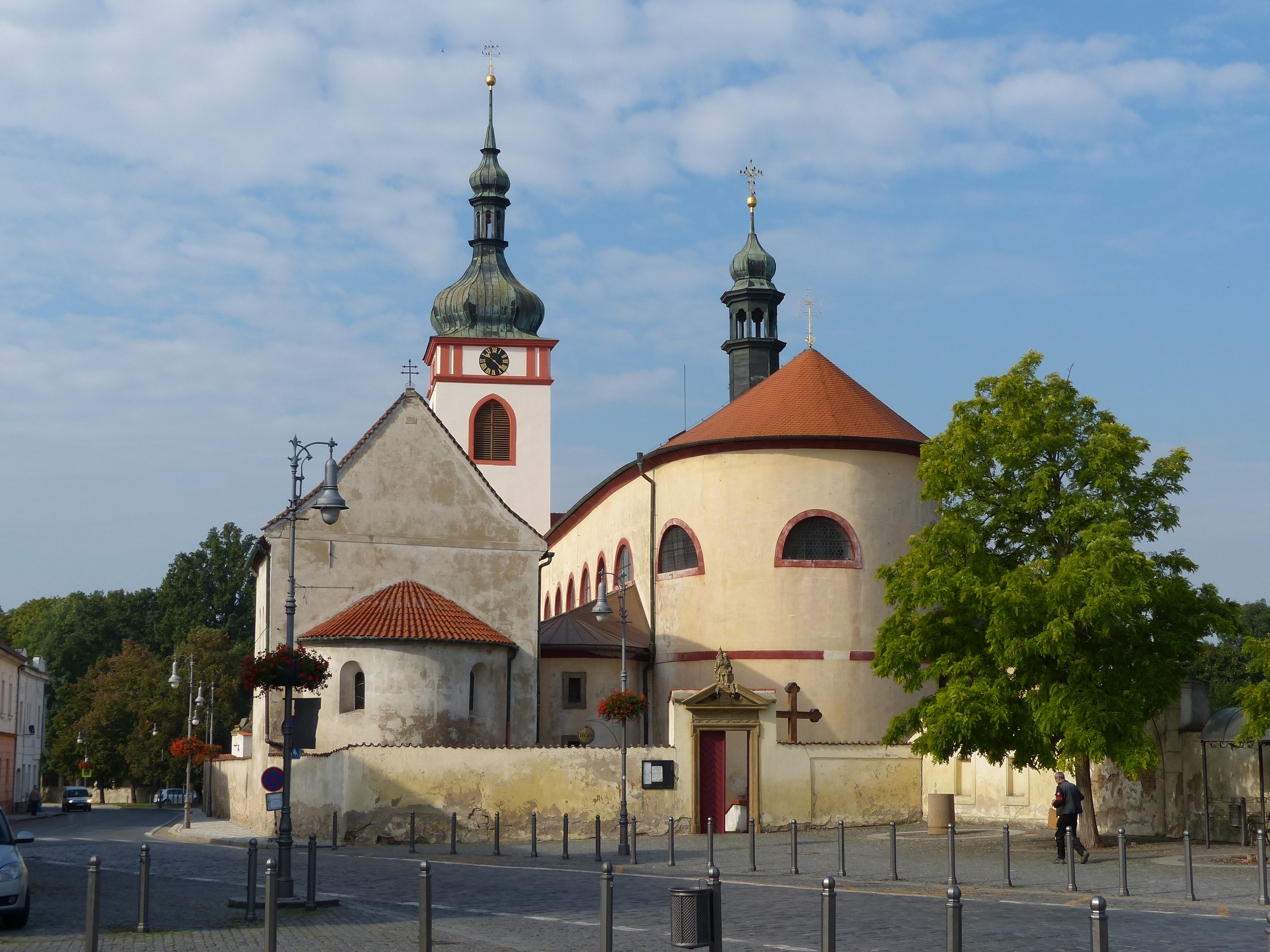 Kostel svatého Václava, Maxe Švabinského, Stará Boleslav.